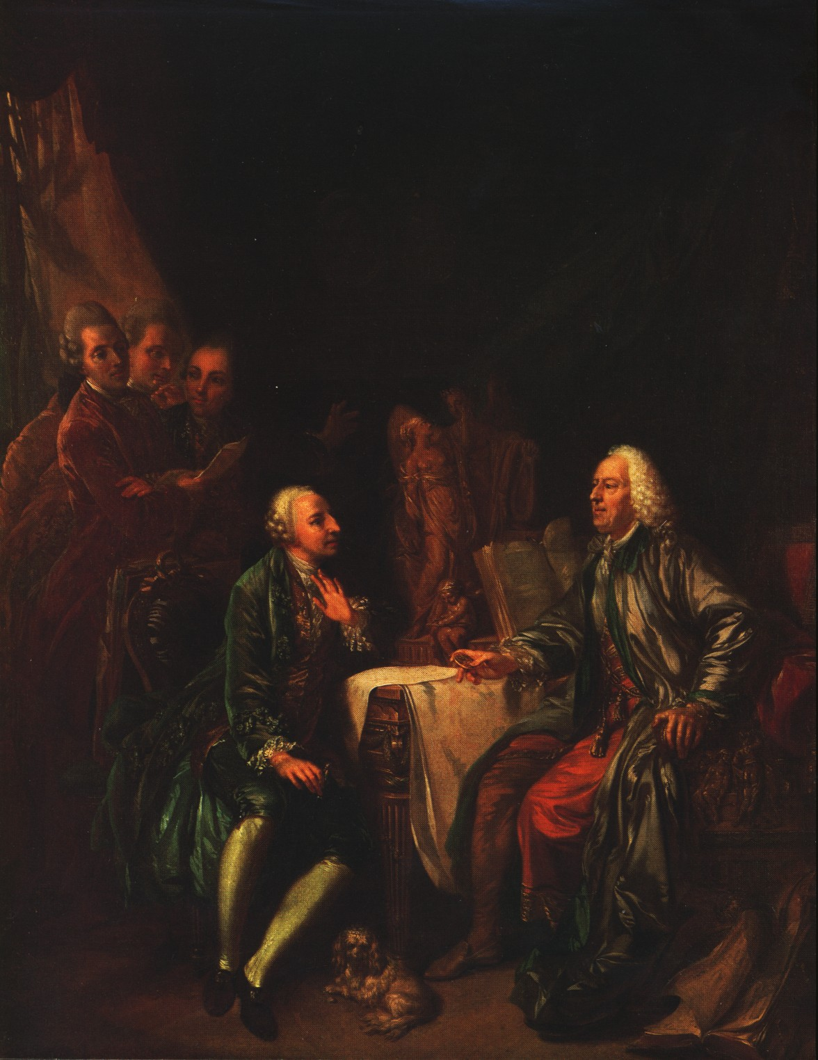 Johann Eleazar Zeissig, genannt Schenau: Das Kunstgespräch. Ölgemälde 1777, Gemäldegalerie Alte Meister, Dresden